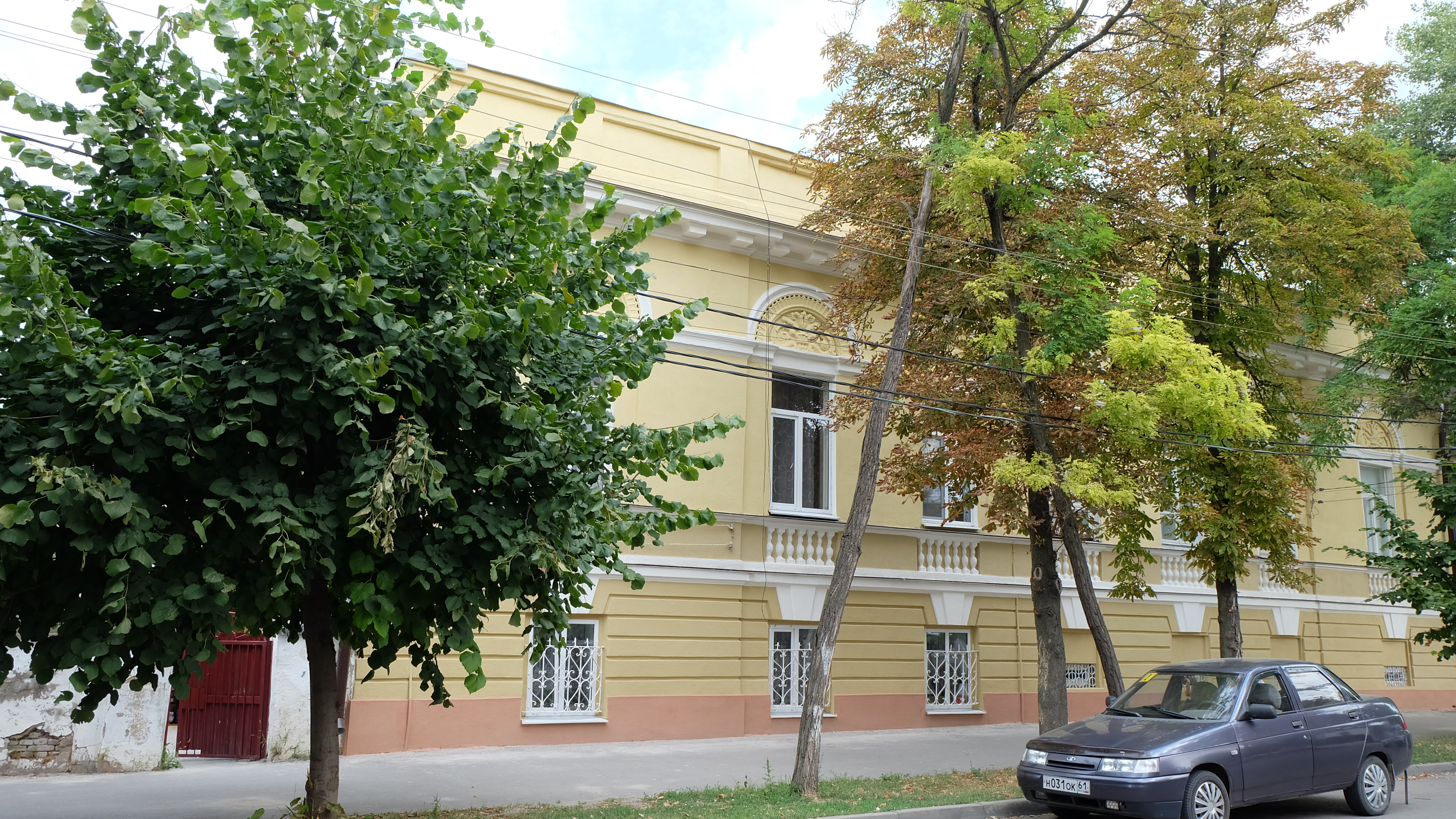 Жилой дом, комплекс застройки улицы: улица Греческая, 84, Таганрог, Ростовская область